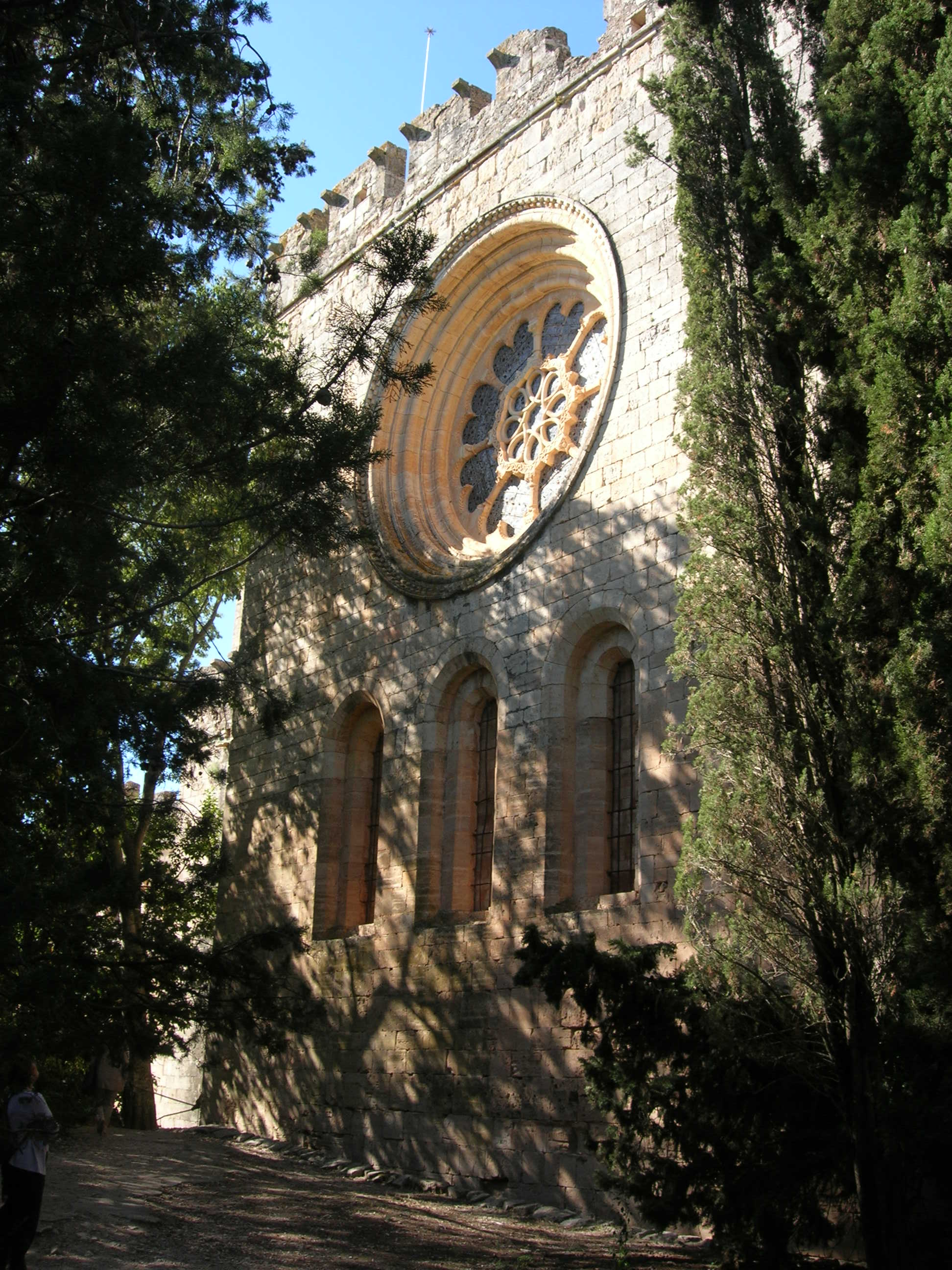 Abside et rosace de l'église du monastère de Santes Creus, Catalogne, Espagne